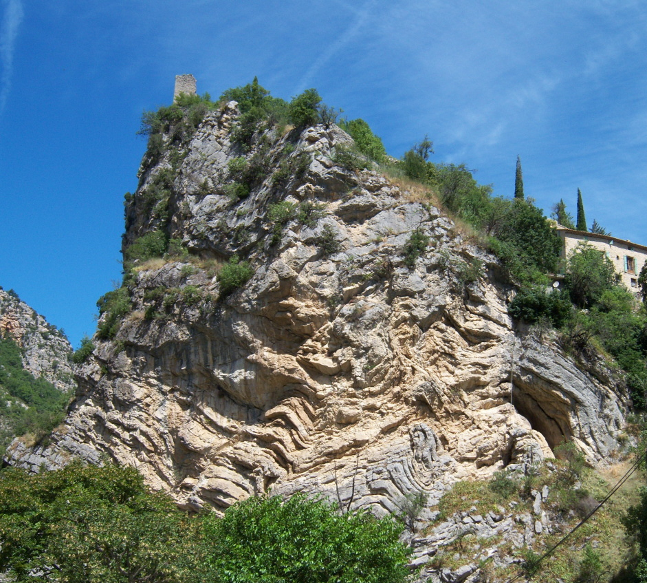 Rocher de Saint May dans la vallée de l'Aigue (Drôme)